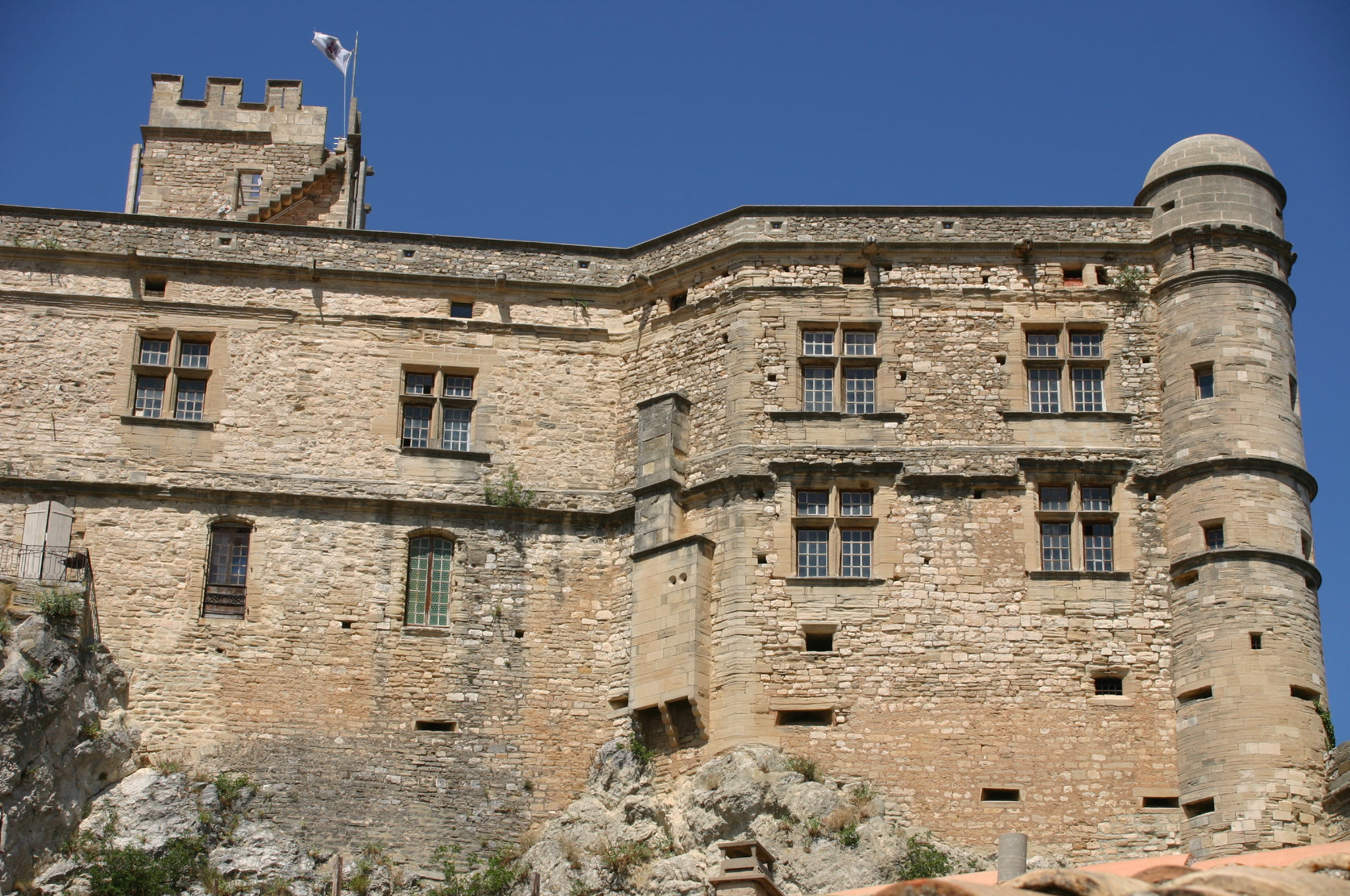 Castle of Le Barroux, commune de Le Barroux, canton Malaucène, departement Vaucluse, region Provence-Alpes-Côte d'Azur